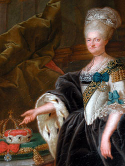 Maria Kunigunde von Sachsen († 1826) als Fürstäbtissin von Essen, zeitgenössisches Gemälde